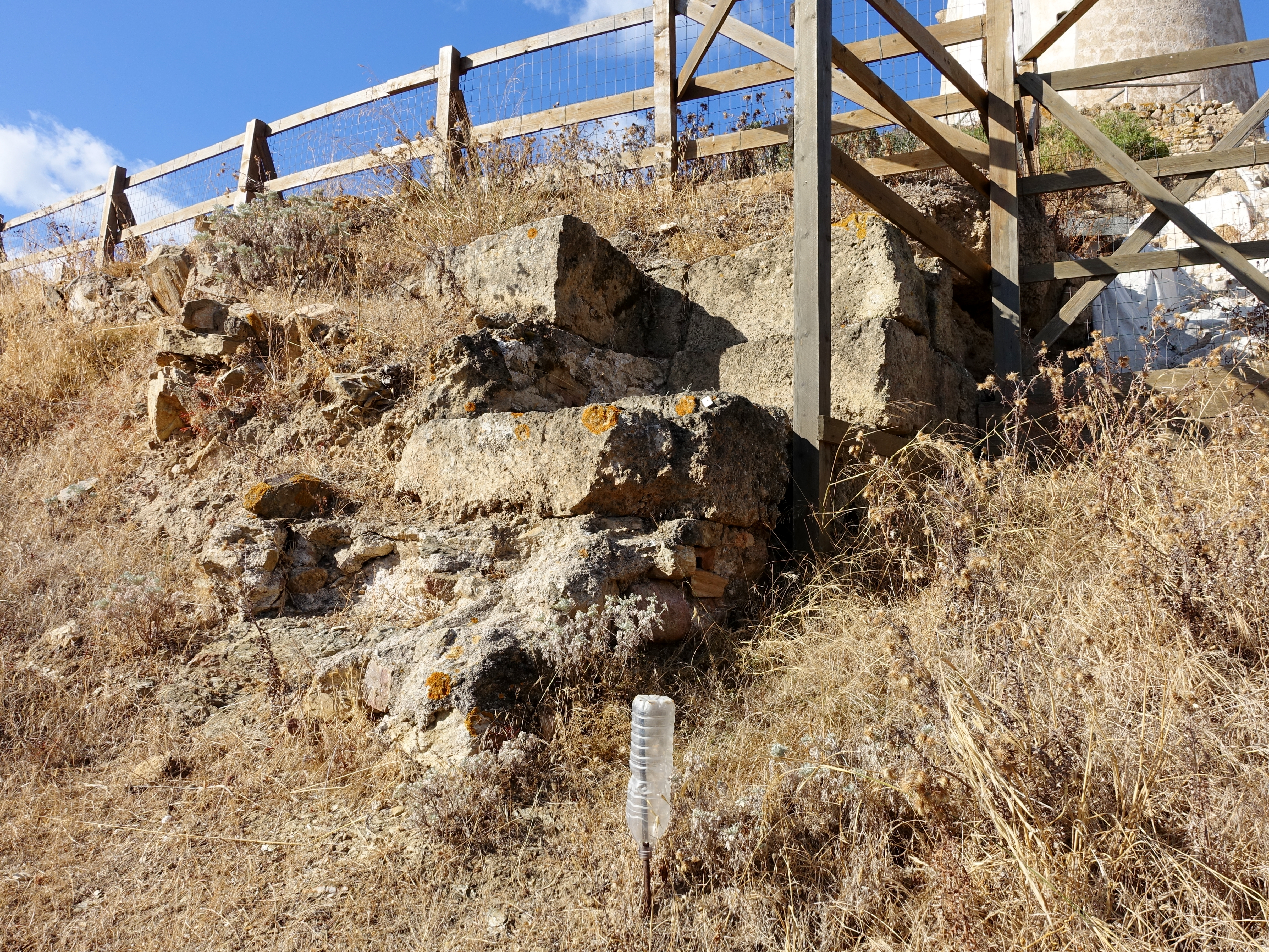 Ausgrabungsstätte von Bithia am Turm von Chia (Torre di Chia), Gemeinde Domus de Maria, Sardinien, Italien